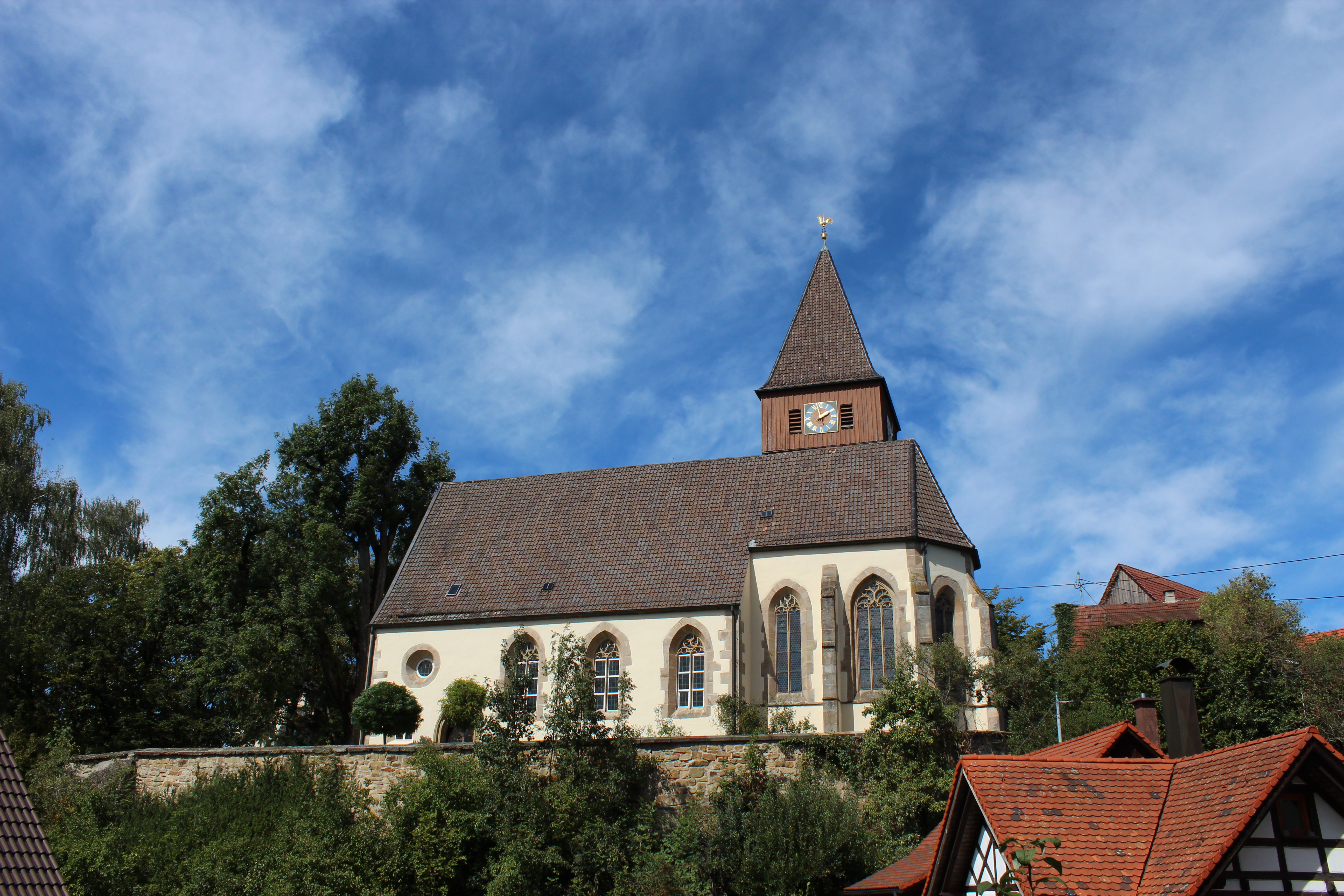 Blick auf die evangelische Johanniskirche in Eschach.